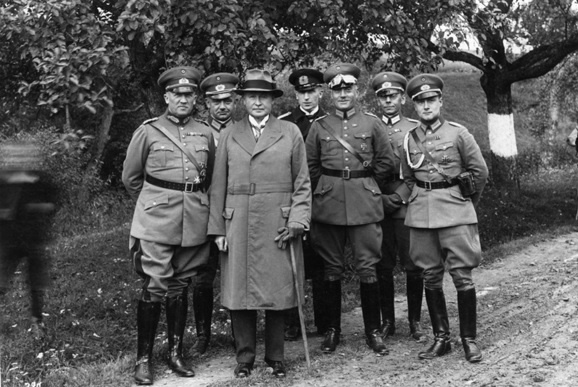 Fotografie von Wilhelm Groener und Reichswehroffizieren aus der Adjudantur des Reichswehrministeriums. Von links nach rechts Kurt von Schleicher, Ferdinand Noeldechen, Wilhelm Groener, Hubert Schmundt, Robert Praetorius, von Waldenfels, von Wechmar